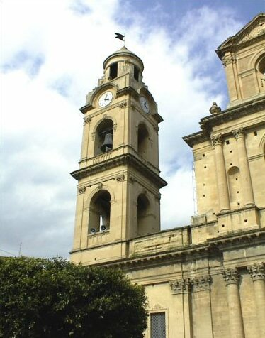 Immagine presa da Sicily-Photos che raffigura un momento della festa di San Giuseppe a Scordia.